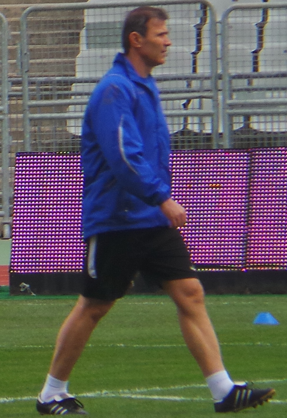 Hayrettin Demirbaş